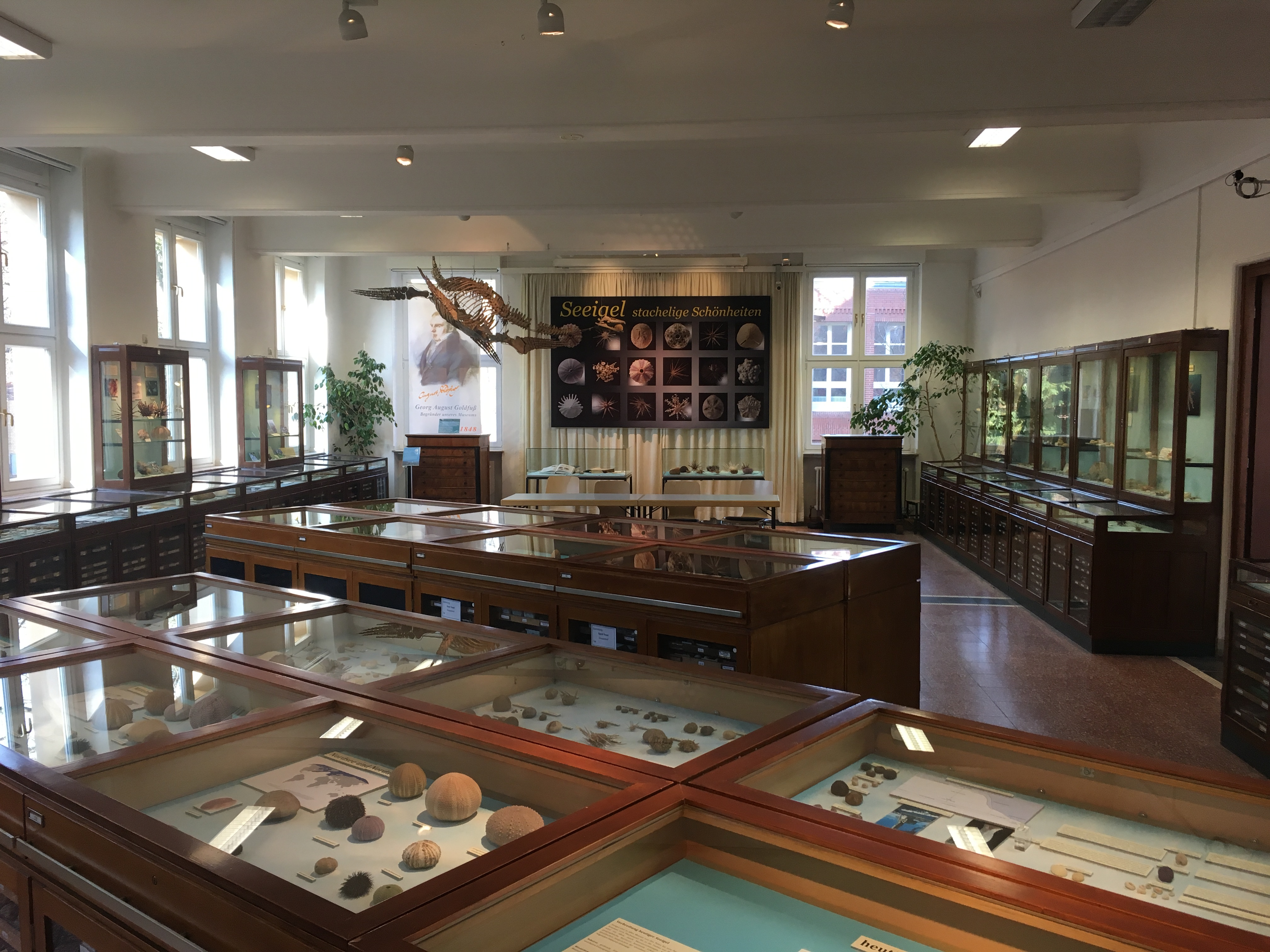 Goldfuß-Museum, eine paläontologische Schausammlung in Bonn